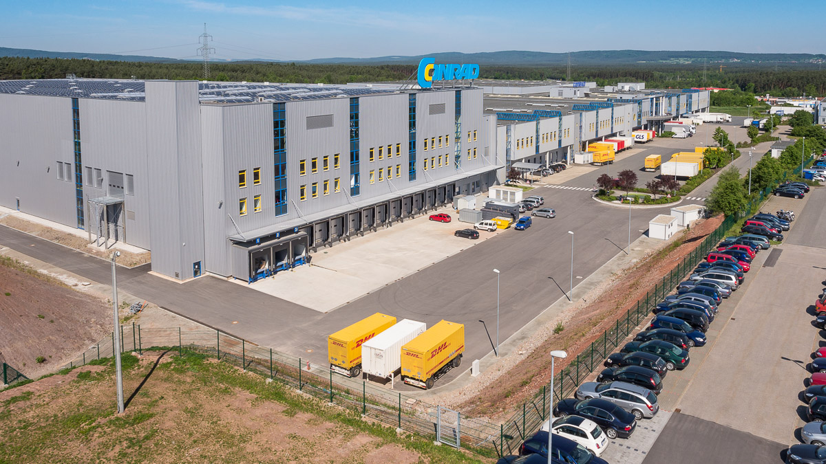 Logistické centrum Conrad Electronic ve Wernbergu